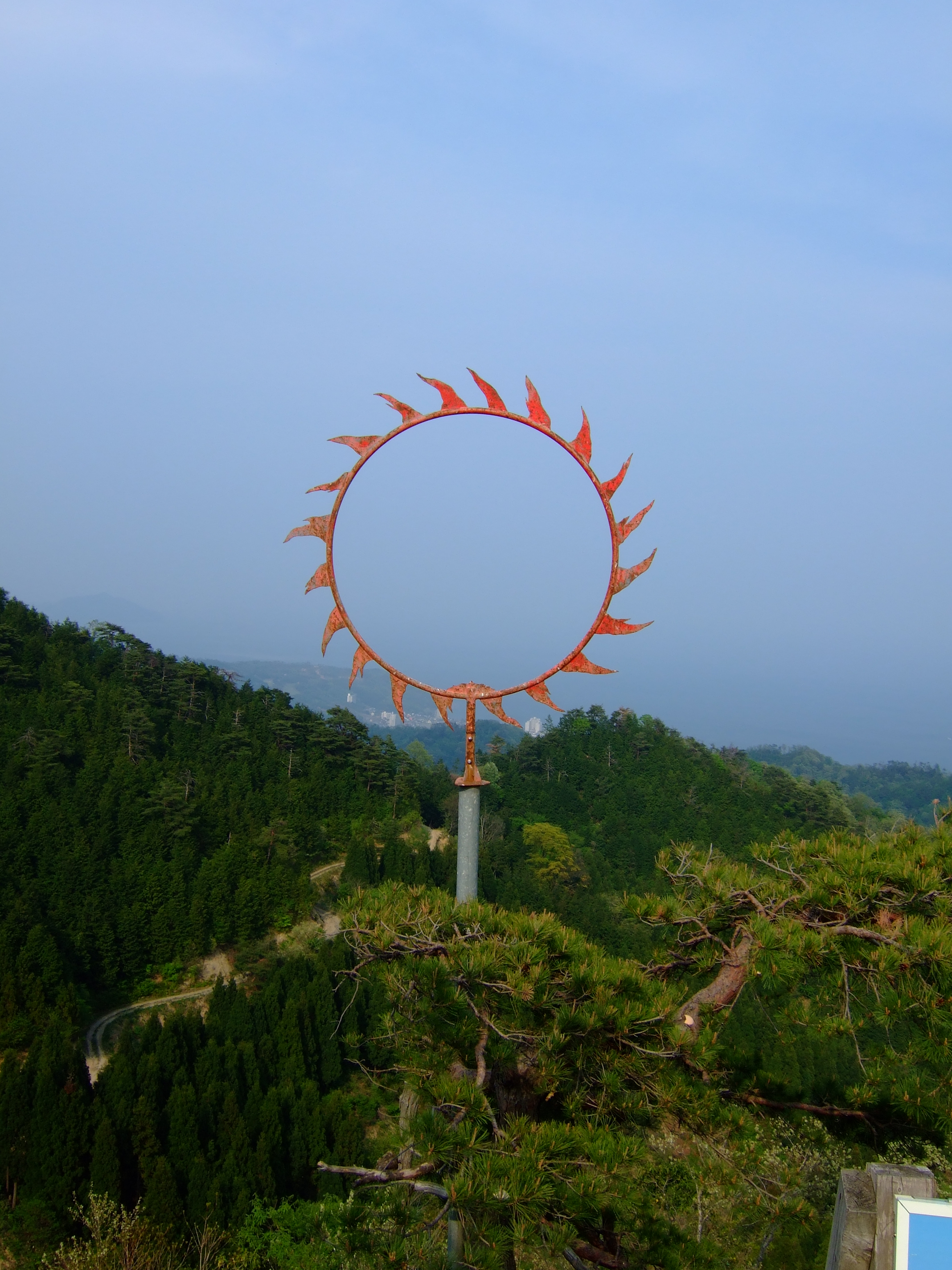 成相寺